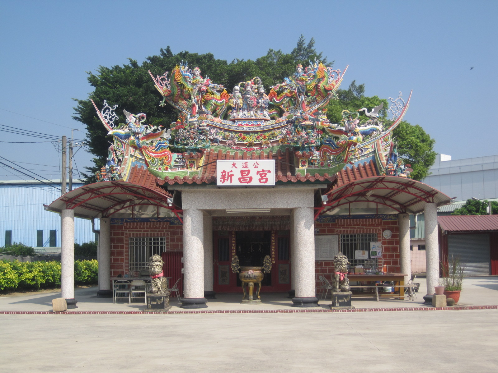 新市大道公新昌宮